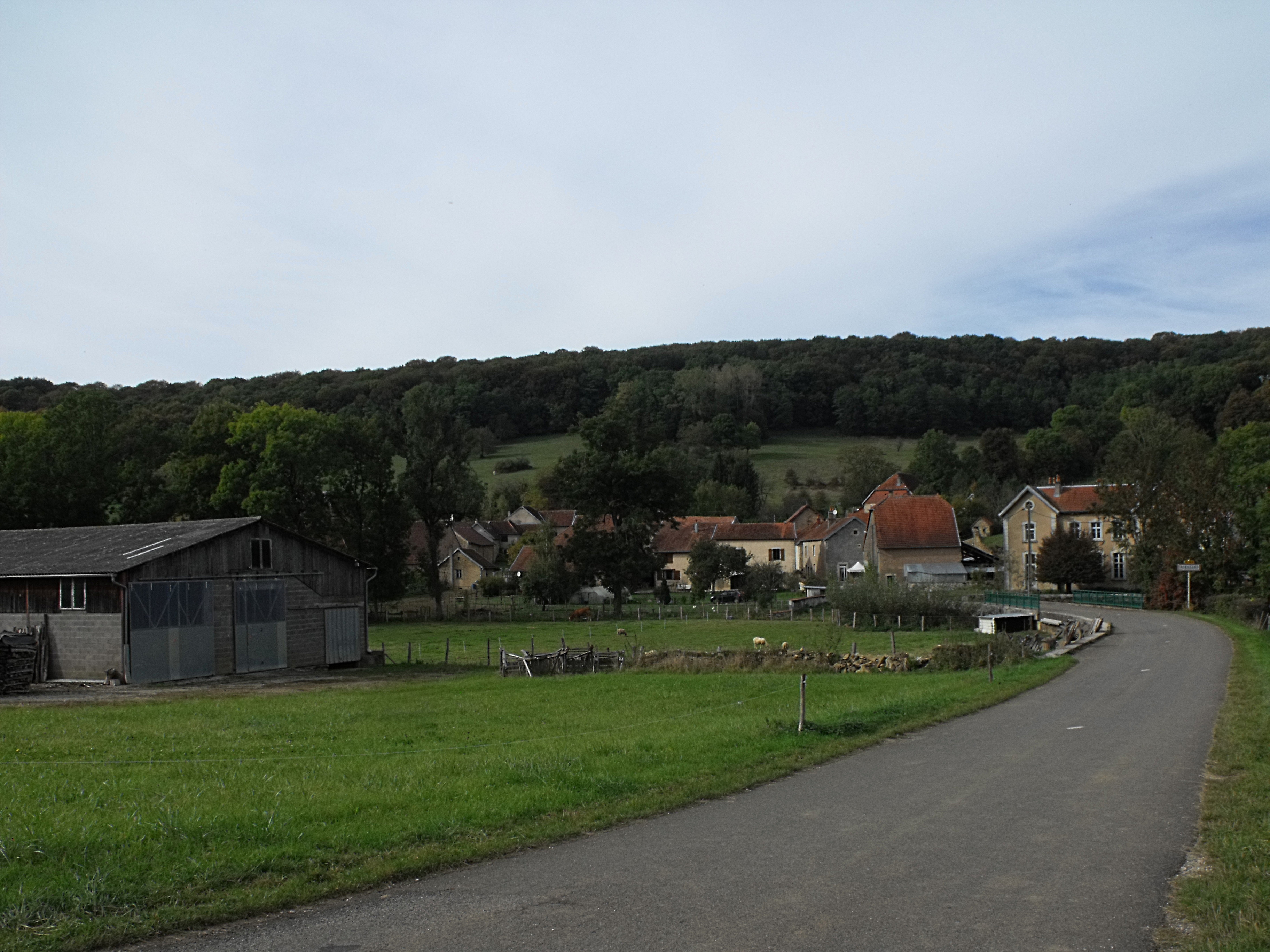 Vue générale de Puessans, Doubs, France